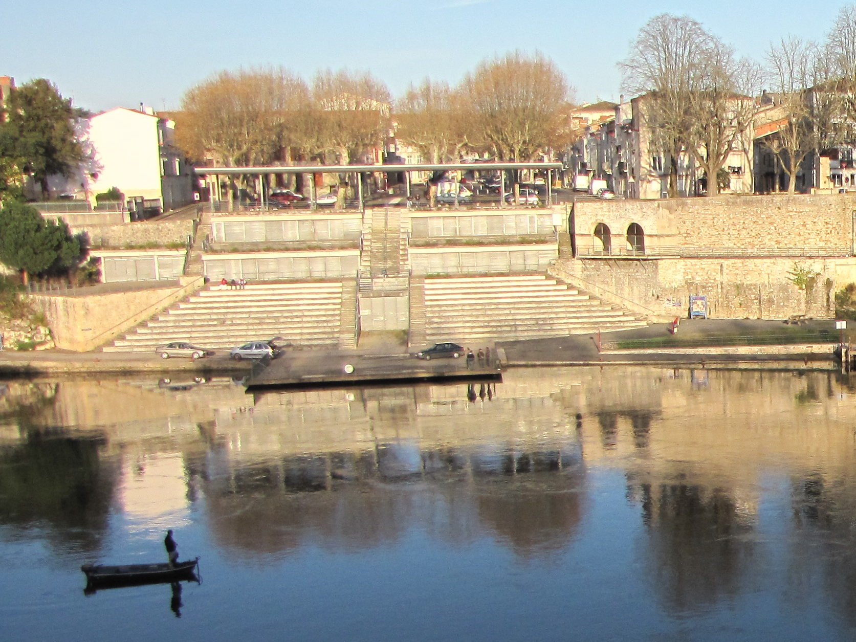 Tribunes pour les compétions d'aviron de Villeneuve-sur-Lot